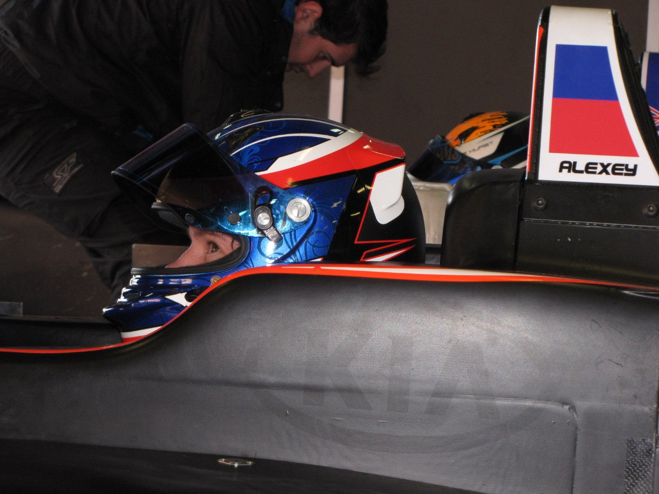 Каталунья, коллективные тесты Winter Series F3 Open 14.03.13